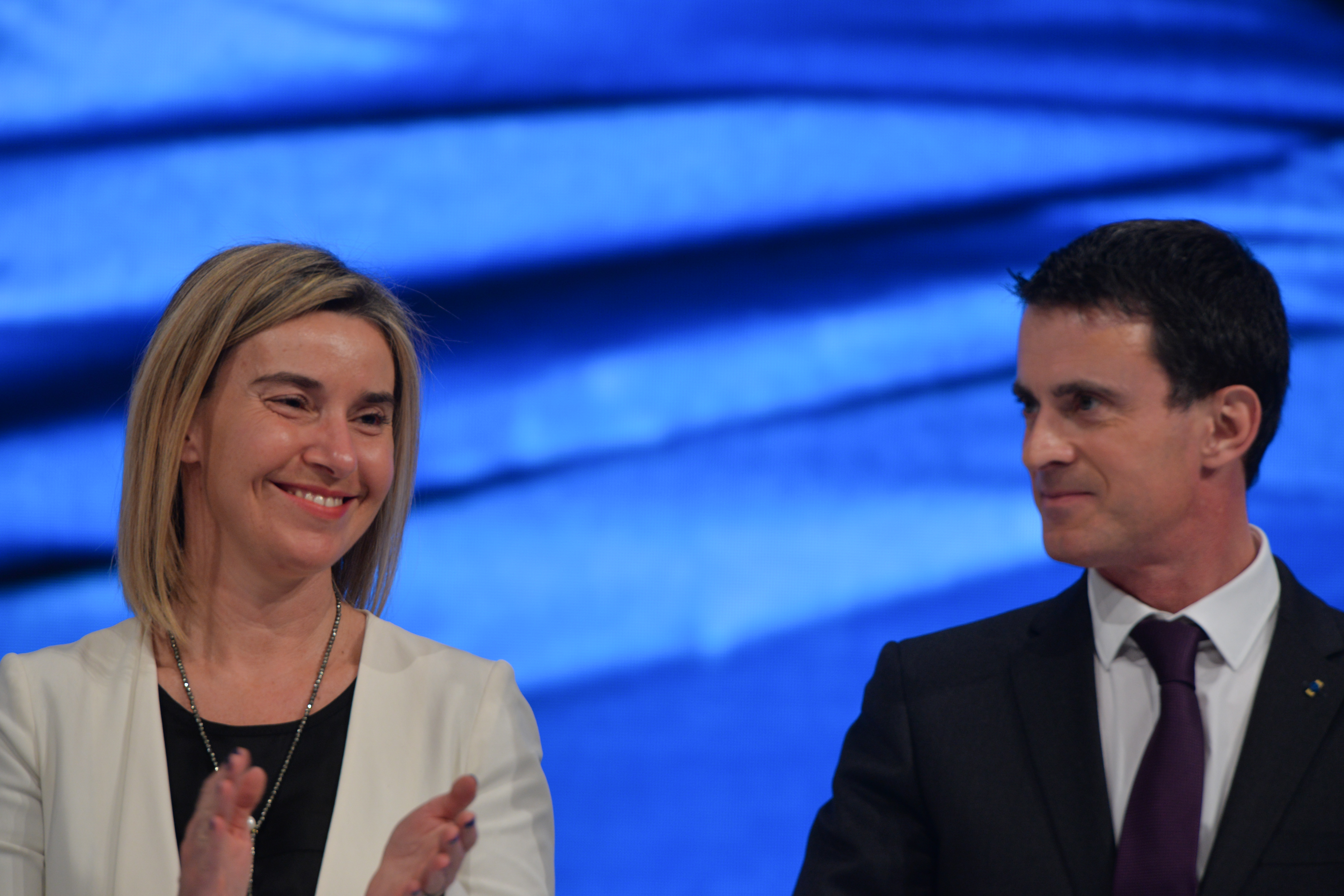 SPD Bundesparteitag 2015 - Gruppenaufnahmen